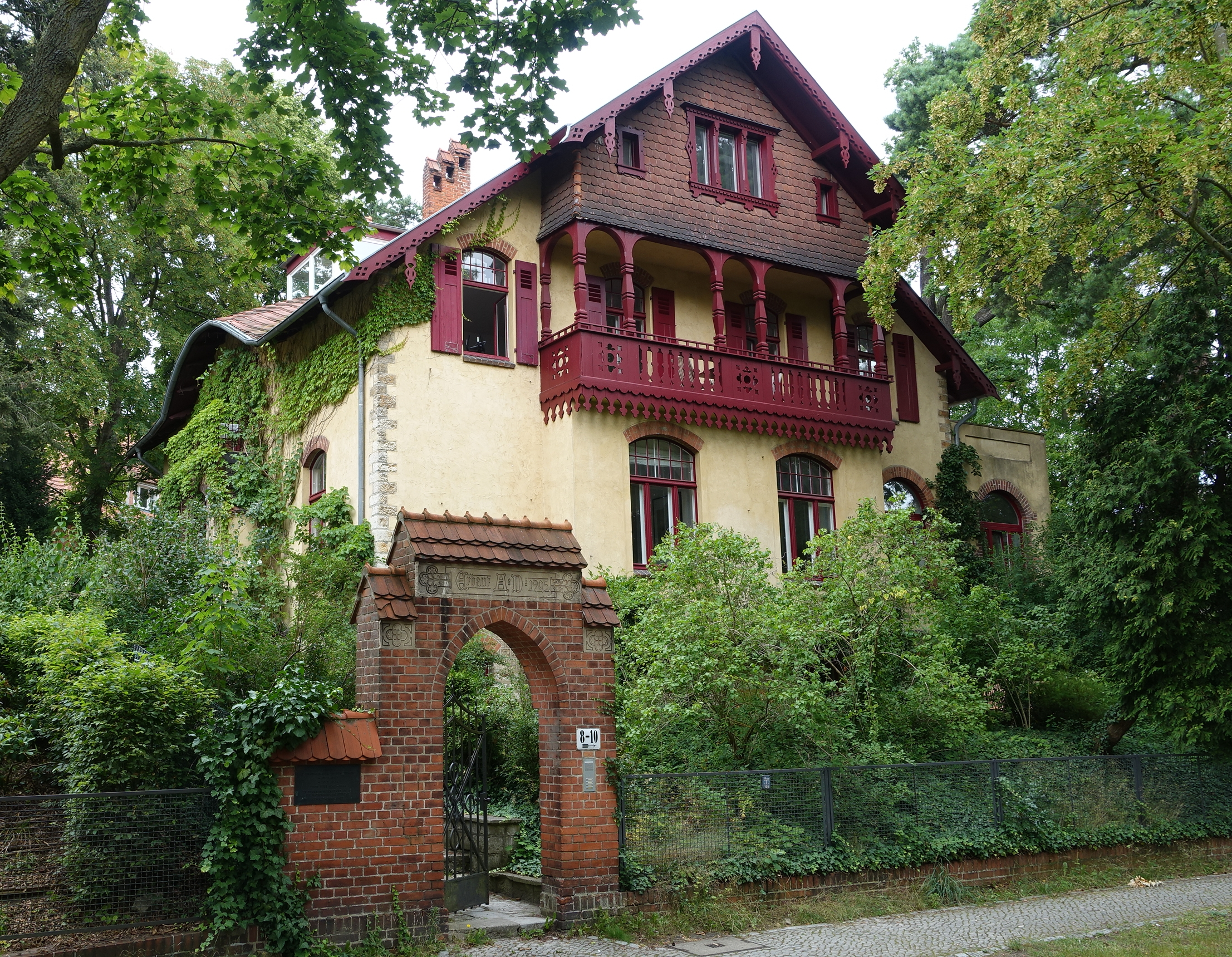 Wohnhaus